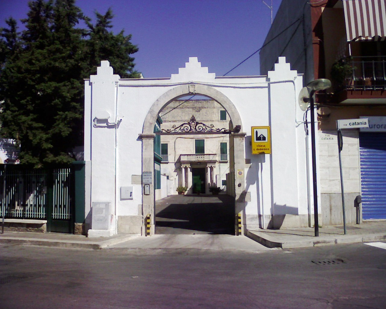 chiesa s.domenico-modugno